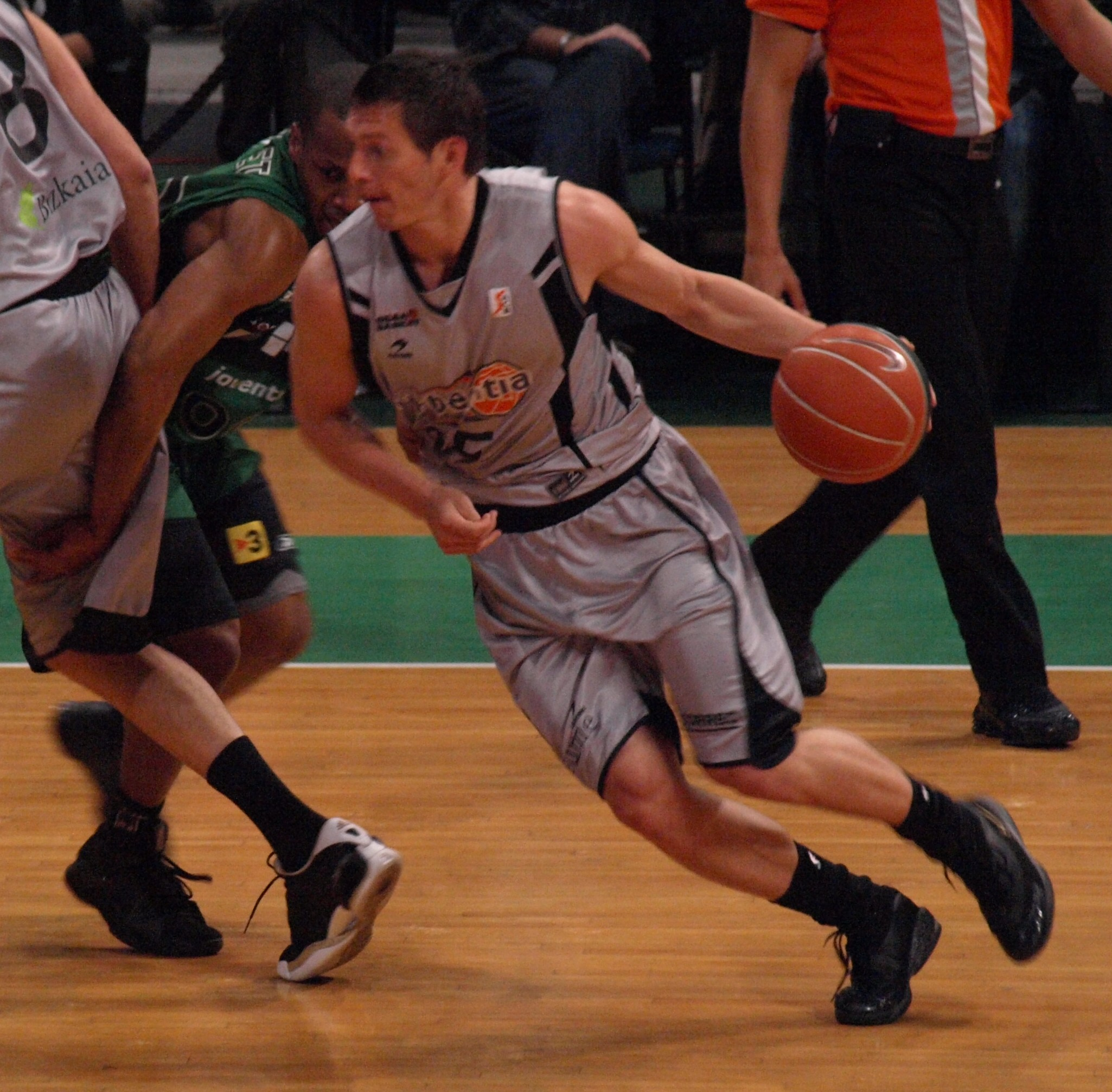 Janis Blums en el encuentro que enfrentó al Iurbetia Bilbao con el DKV Joventut de la liga ACB 2008/09 en el olímpico de Badalona